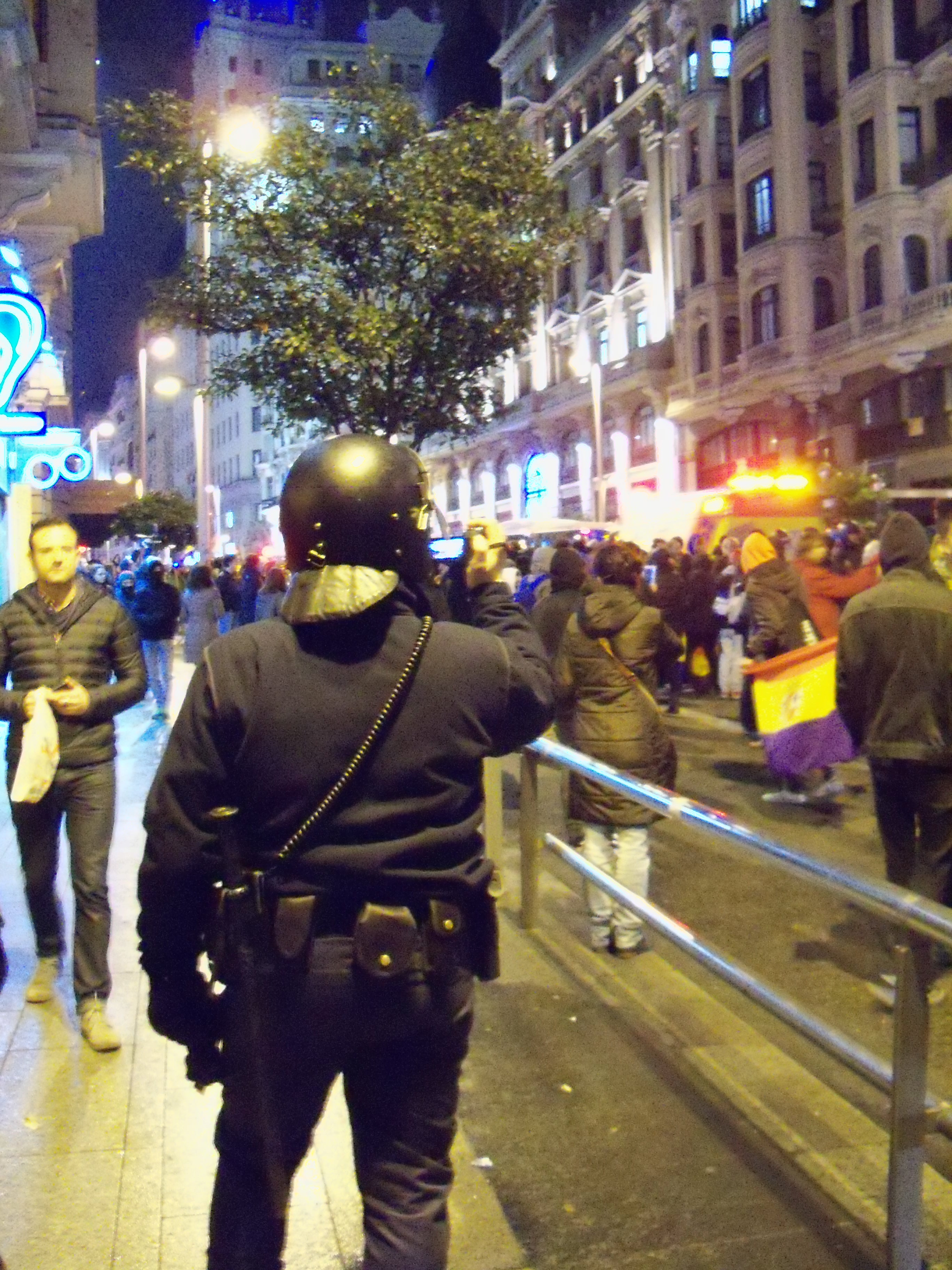 Manifestación por Madrid en apoyo al barrio burgalés de Gamonal, 17 de enero de 2014